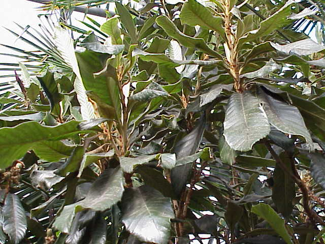 Species: Eriobotrya japonica Family: Rosaceae Image No. 1